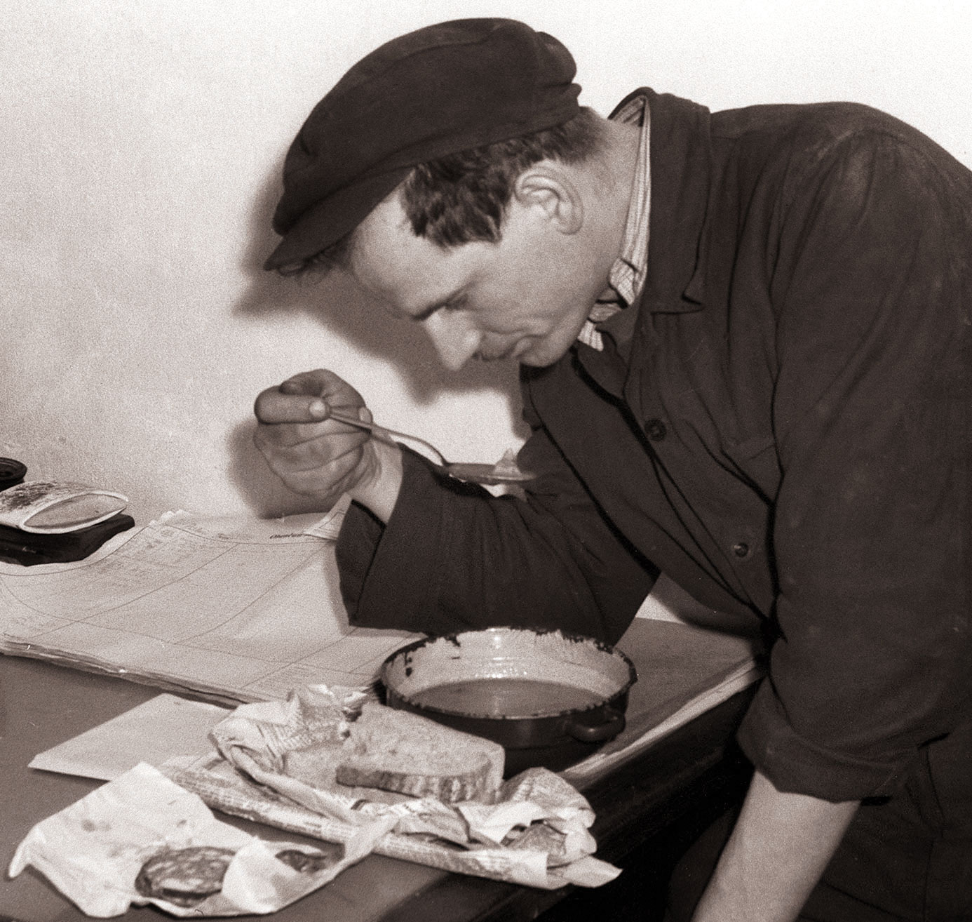 Tovarna poljedelskih strojev - delavec med malico